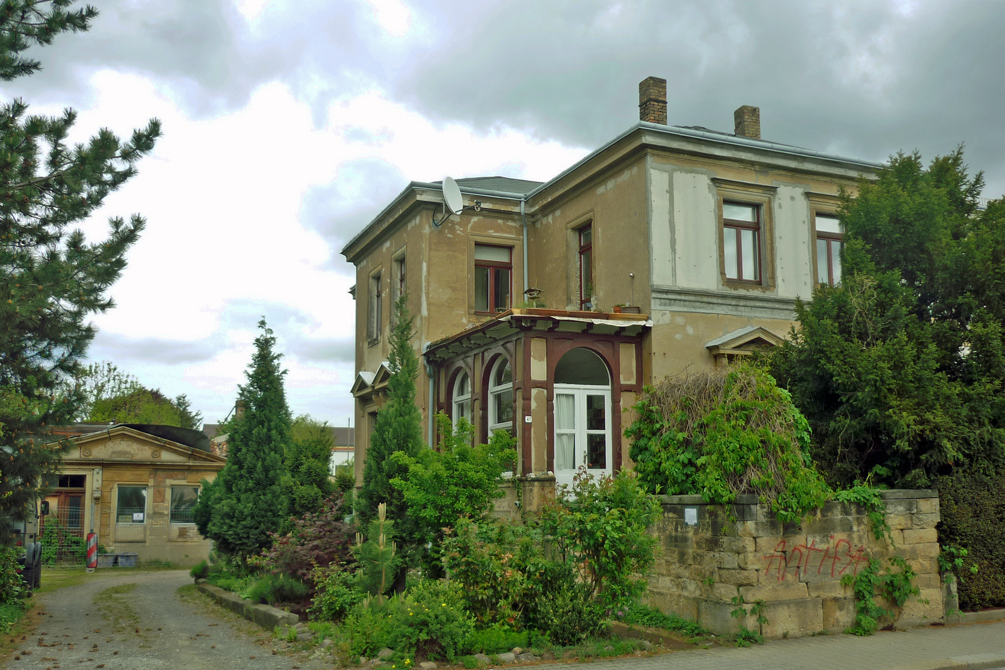 Villa Fichtner und ehem. Contor (links) in Dresden-Plauen, Würzburger Str. 41, bis 1937 Baugeschäft Gebr. Fichtner „Baugeschäft mit Büro für Architektur und Bauausführung“, Inh. Conrad Albert O. Fichtner und Ferdinand William Fichtner.